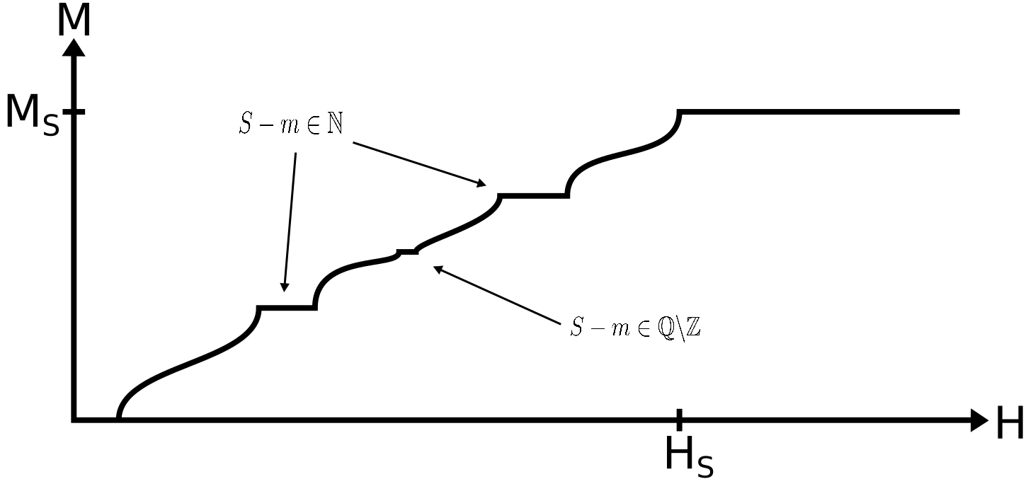 Courbe d'aimantation comportant des plateaux.